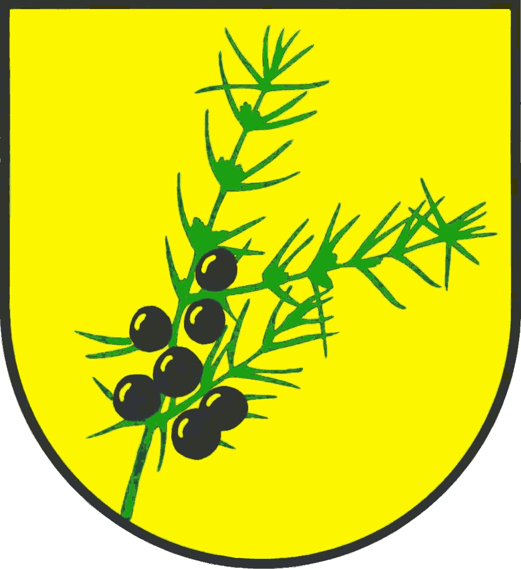 Coat of arms of the municipality Jörl in Schleswig-Holstein, Germany.